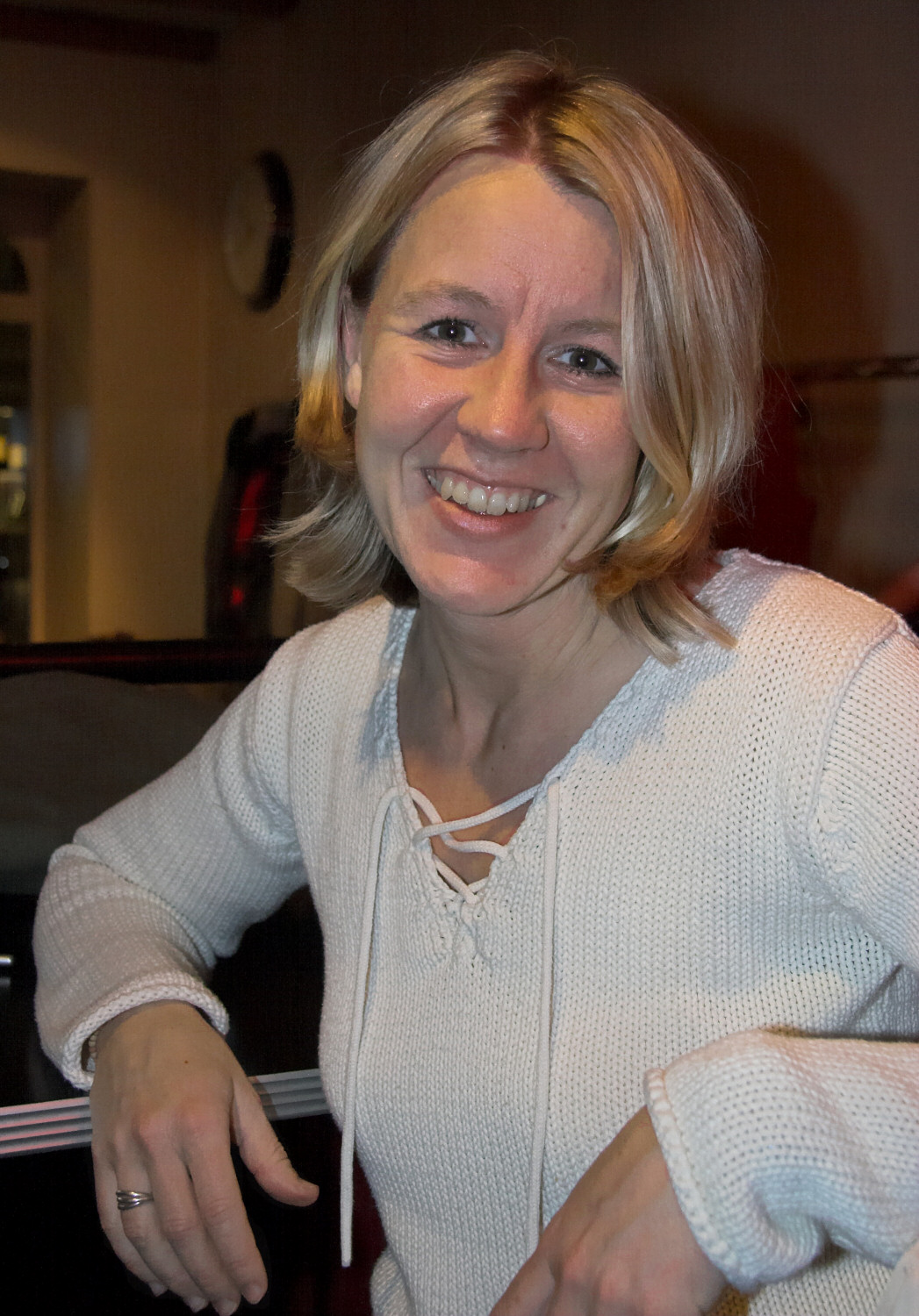 Mirjam Müntefering bei einer Lesung in Regensburg